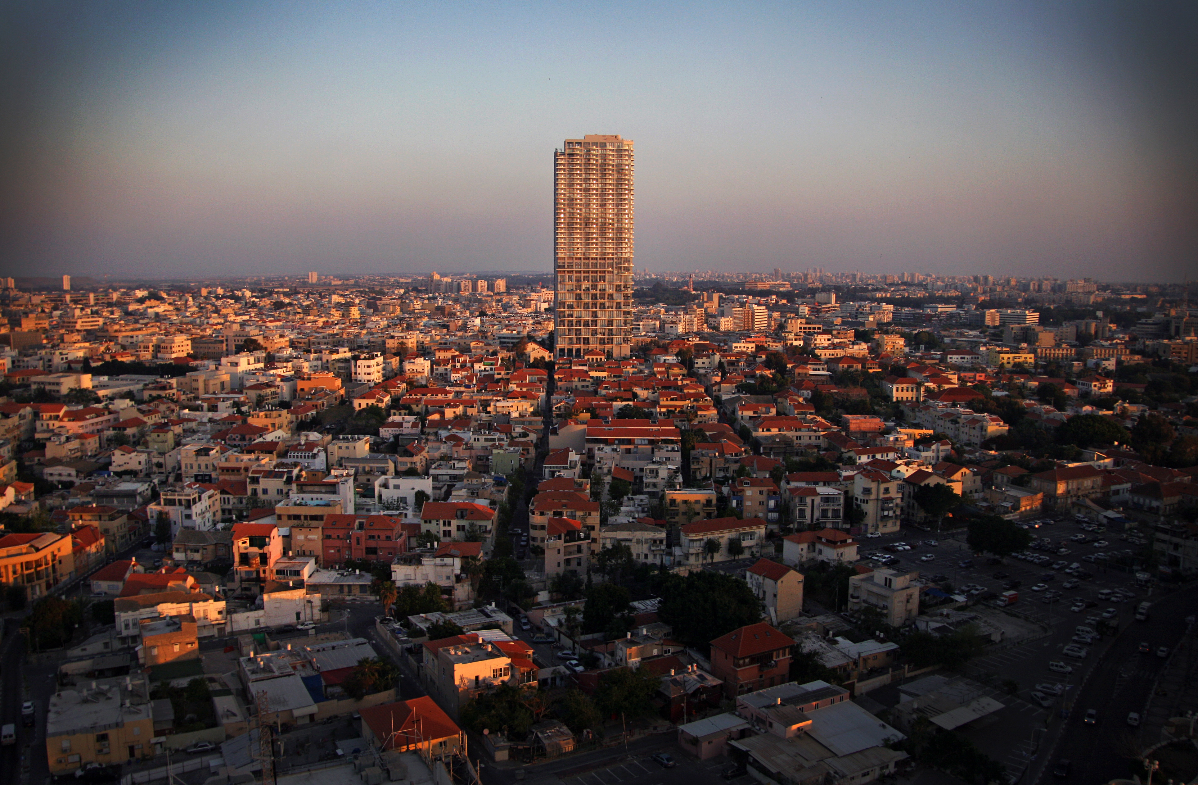 בית הכנסת אורחים ברח' שבזי בתל אביב